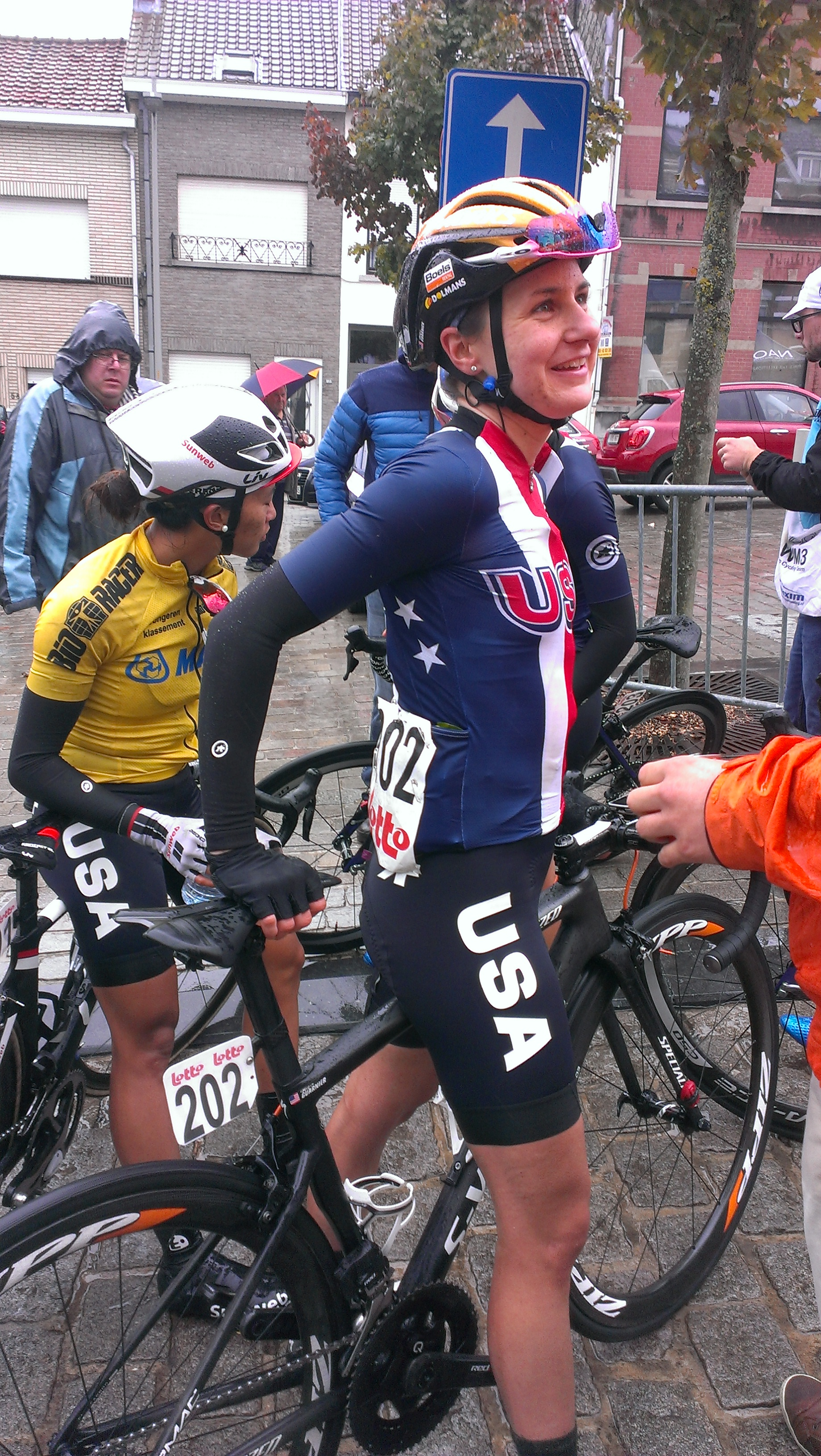 Na de finish van de 3e en laatste etappe van de Lotto Belgium Tour 2017 in Geraardsbergen.